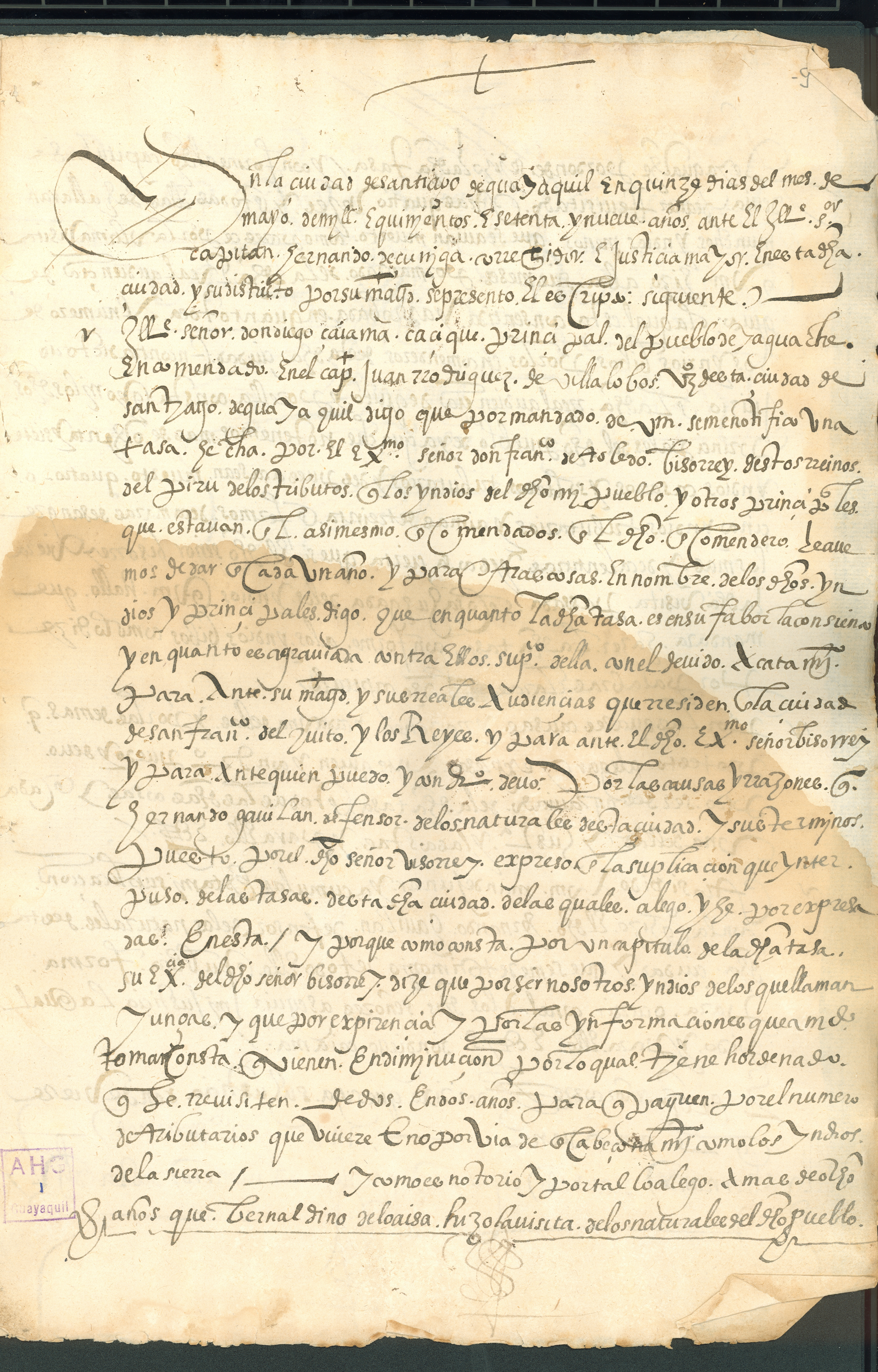 Loor Jara, Susana. (2010). Catalogo del Fondo Documental de Manuscritos del Archivo Histórico del Guayas (AHG) Tomo I, página(s) 9. Guayaquil, Ecuador: Banco Central del Ecuador y Ministerio de Cultura del Ecuador. MFN:0001 – AHG / Escritura Publica: Juicio. Don Diego de Sayama, Cacique, sobre tributos de los indios de Yaguachi / Escribanía de Hernando de Arnedo, fechado en Santiago de Guayaquil a 10.VI.1579